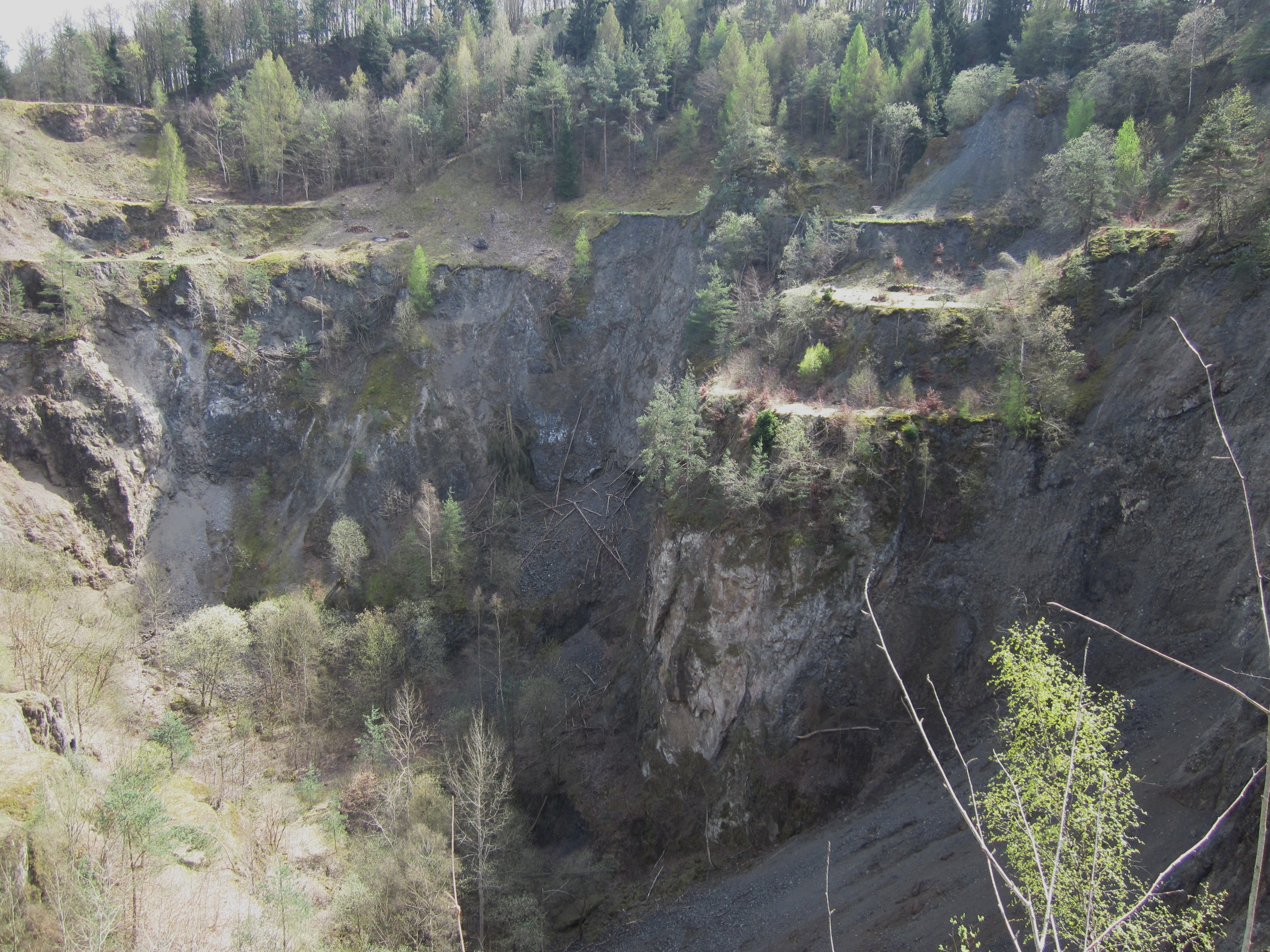 NSG Sodenberg-Gans - Blick in den "Krater" (aufgelassener Basalt-Steinbruch)